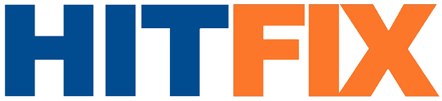 "La Oficina ahora es una sombra pálida y apática de lo que solía ser". -Alan Sepinwall de HitFix en septiembre de 2011, durante la octava temporada de la serie.